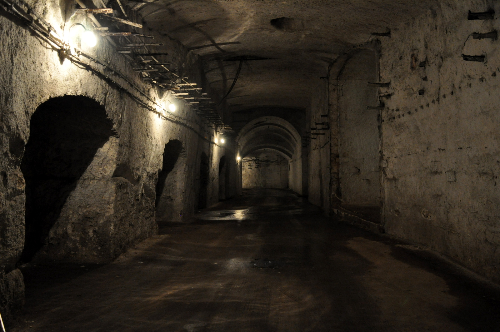 Kőbánya limestone mine